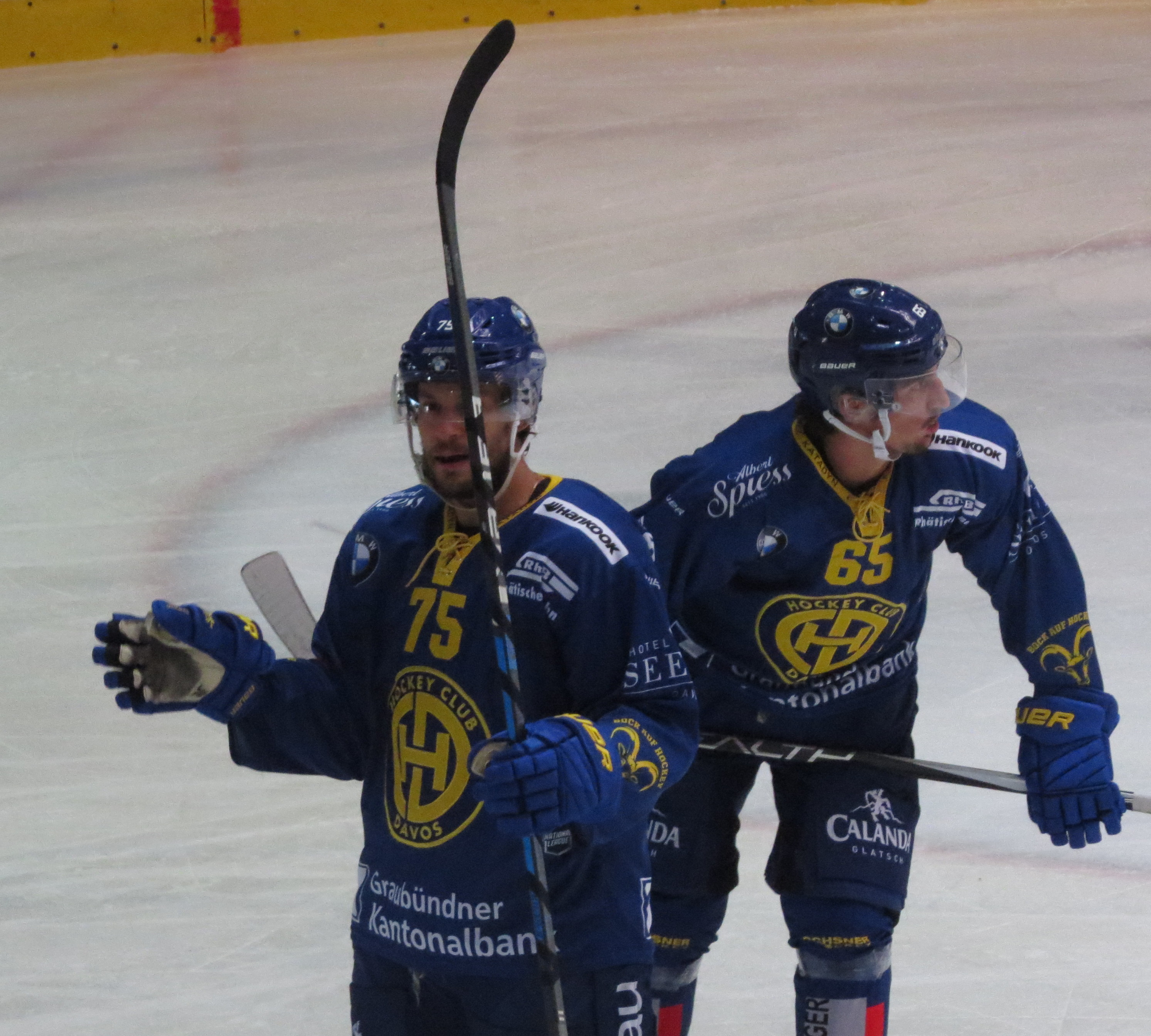 Match entre le CSKA Moscou et HC Davos le 15 août 2018 au Sentier (Hockeyades)